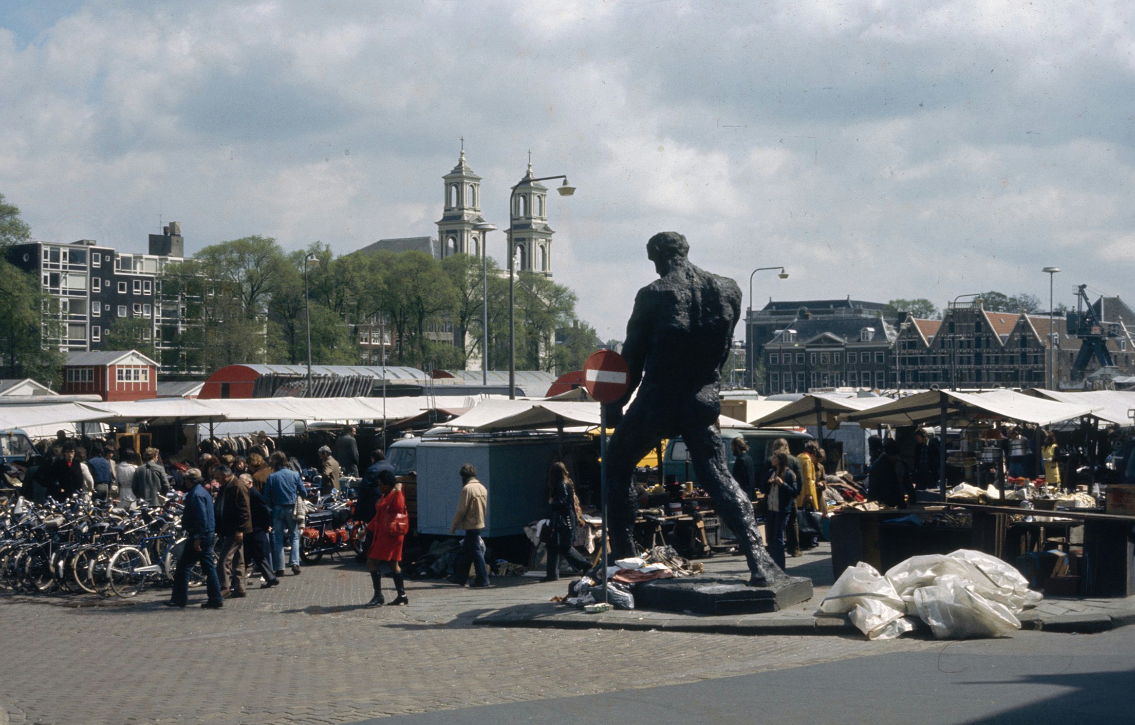 Exterieur OVERZICHT